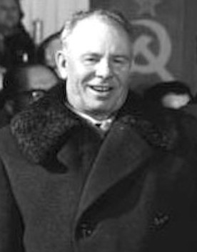 Factual corrections and alternative descriptions are encouraged separately from the original description. Additionally errors can be reported at this page to inform the Bundesarchiv. Original historic description: Berlin, VI. SED-Parteitag, Ulbricht, Chruschtschow Zentralbild /Junge 14.1.1963 N.S. Chruschtschow in Berlin eingetroffen Der Erste Sekretär des ZK der KPdSU, N.S. Chruschtschow, traf am Abend des 14.1.1963 an der Spitze der sowjetischen Delegation zum VI. Parteitag der SED in der Hauptstadt der DDR ein. Die repräsentative Abordnung der sowjetischen Bruderpartei wurde auf dem Berliner Ostbahnhof vom Ersten Sekretär der ZK der SED, Walter Ulbricht, und weiteren Mitgliedern des Politbüros herzlich willkommen geheißen. UBz: Während der Begrüßungskundgebung in der Vorhalle des Ostbahnhofes. (V.l.n.r.) Nikolia Podgorny, Mitglied des Prasidiums des ZK der KPdSU und Erster Sekretär des ZK der KP der Ukraine, Walter Ulbricht, N.S. Chruschtschow und der Kandidat des Politbüros der ZK der SED und 1. Sekretär der Bezirksleitung Groß-Berlin der SED Paul Verner. Abgebildete Personen: * Chruschtschow, Nikita S.: Ministerpräsident, erster Sekretär der KP, Sowjetunion (GND 118638378) * Podgorny, Nikolai: Vorsitzender des Präsidiums des Obersten Sowjets, Sowjetunion * Ulbricht, Walter: Staatsratsvorsitzender, Erster Sekretär des Zentralkomitees (ZK) der SED, Vorsitzender des Nationalen Verteidigungsrates, DDR * Verner, Paul: Vorsitzender des Staatsrates, Sekretär des Zentralkomitees der SED, Präsident des Nationalrates der Nationalen Front, DDR